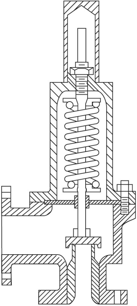 احد انواع الصممات ويدعى صمام تنفيث الضغط